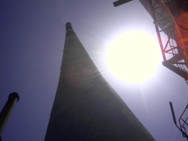 Dimnjak Termoelektrane Plomin 2